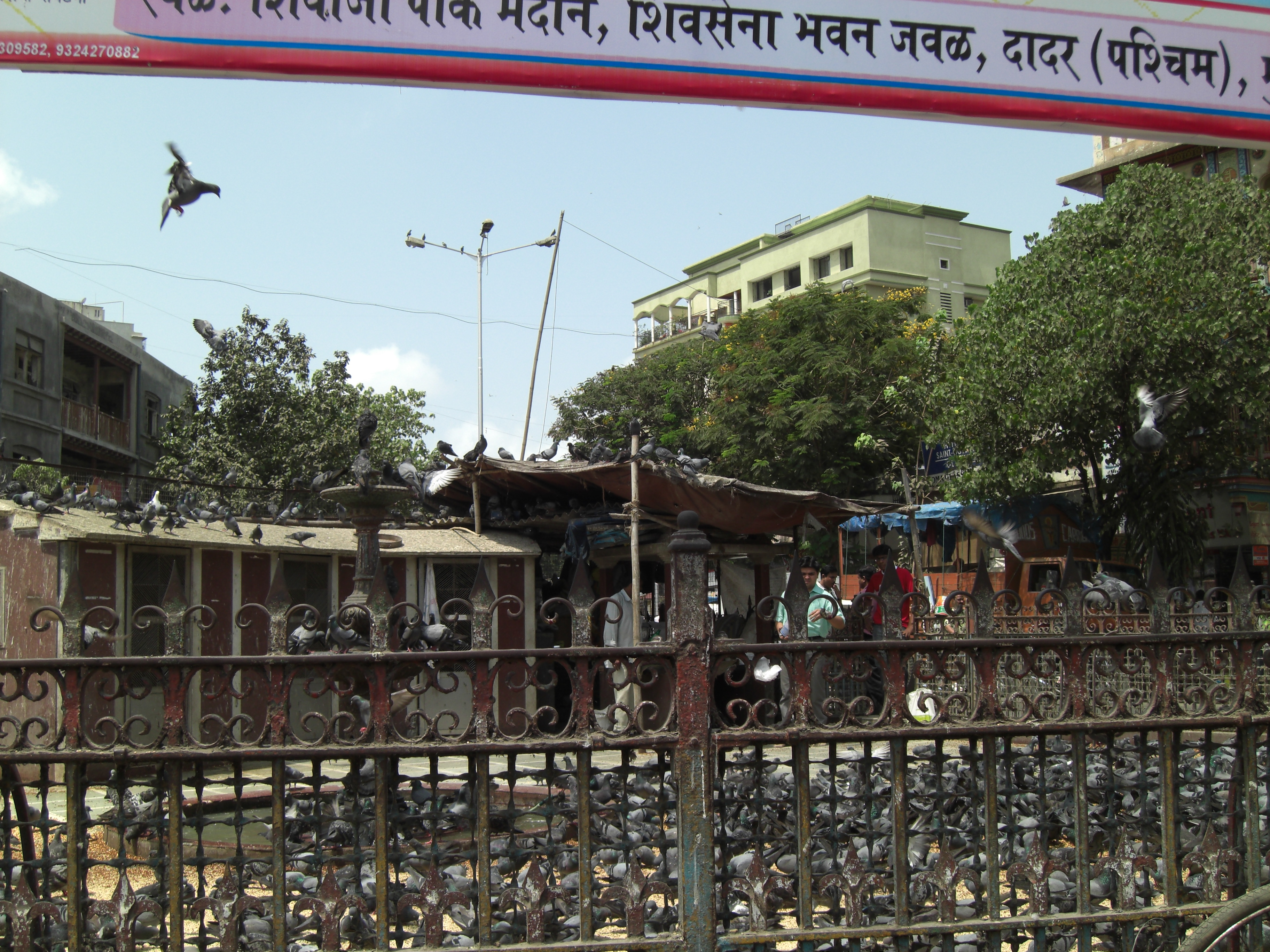 Pigeons Galore